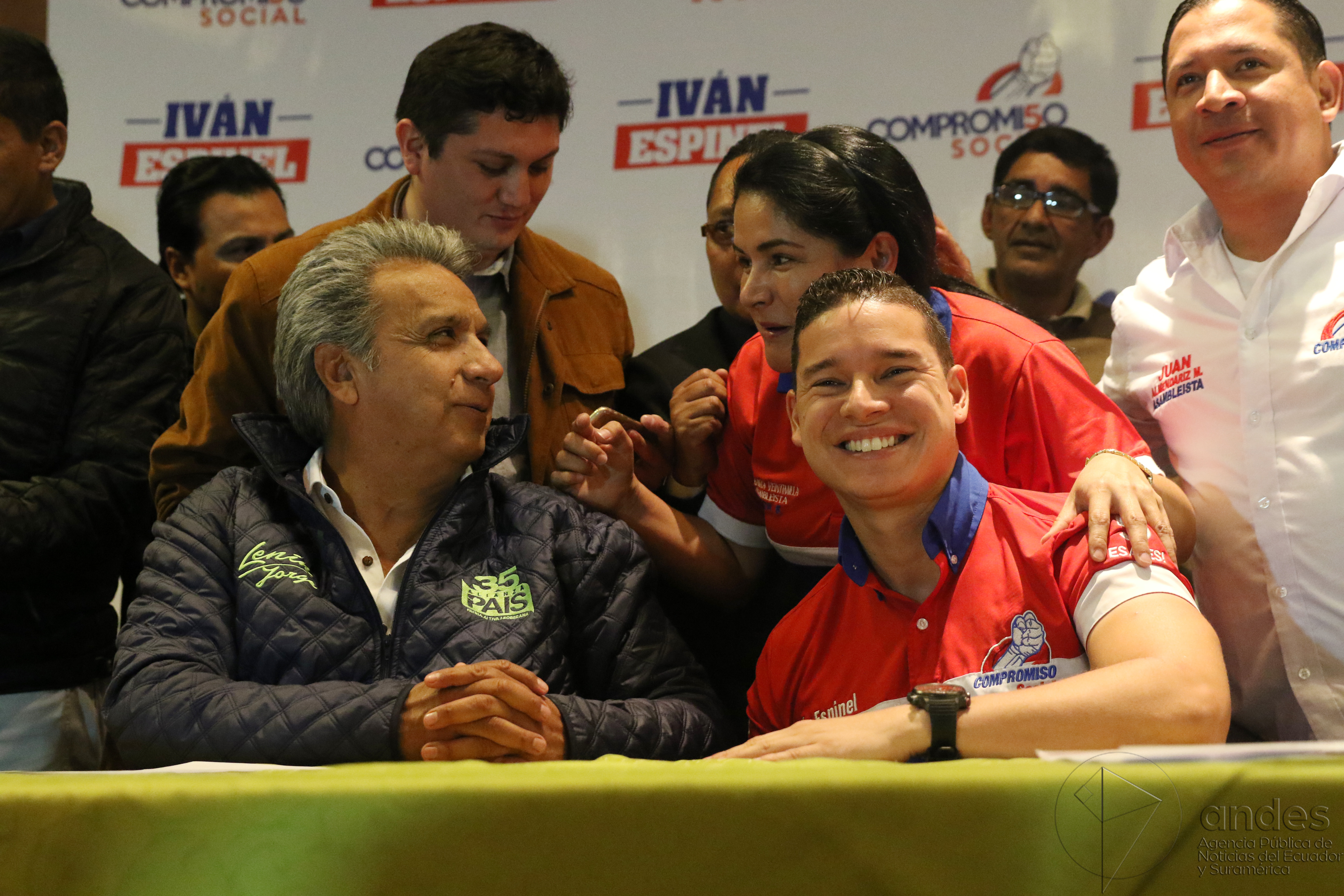 Quito, 09 de marzo de 2017 (Andes).- Iván Espinel y su partido Fuerza Compromiso Social dio a conocer su apoyo al candidato Lenin Moreno en la segunda vuelta electoral camino a la presidencia de la Repúbica el próximo 2 de abril del 2017. ANDES/Micaela Ayala V.